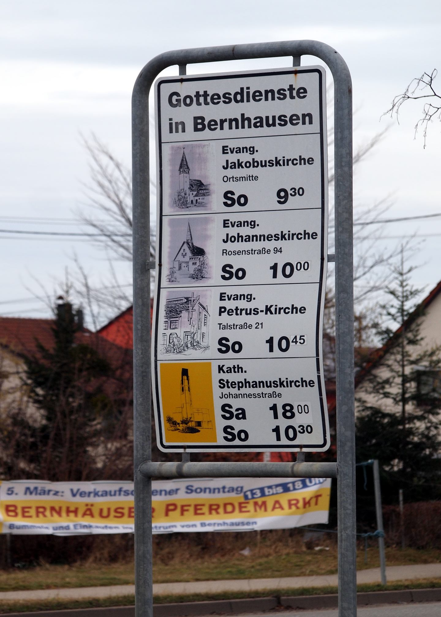 Gottesdienstschild in Bernhausen. Ungewöhnlich informativ mit Anschriften und Bildern der Kirchen. Nicht aufgeführt waren Gospel-Forum Fildern und Glory Life Zentrum